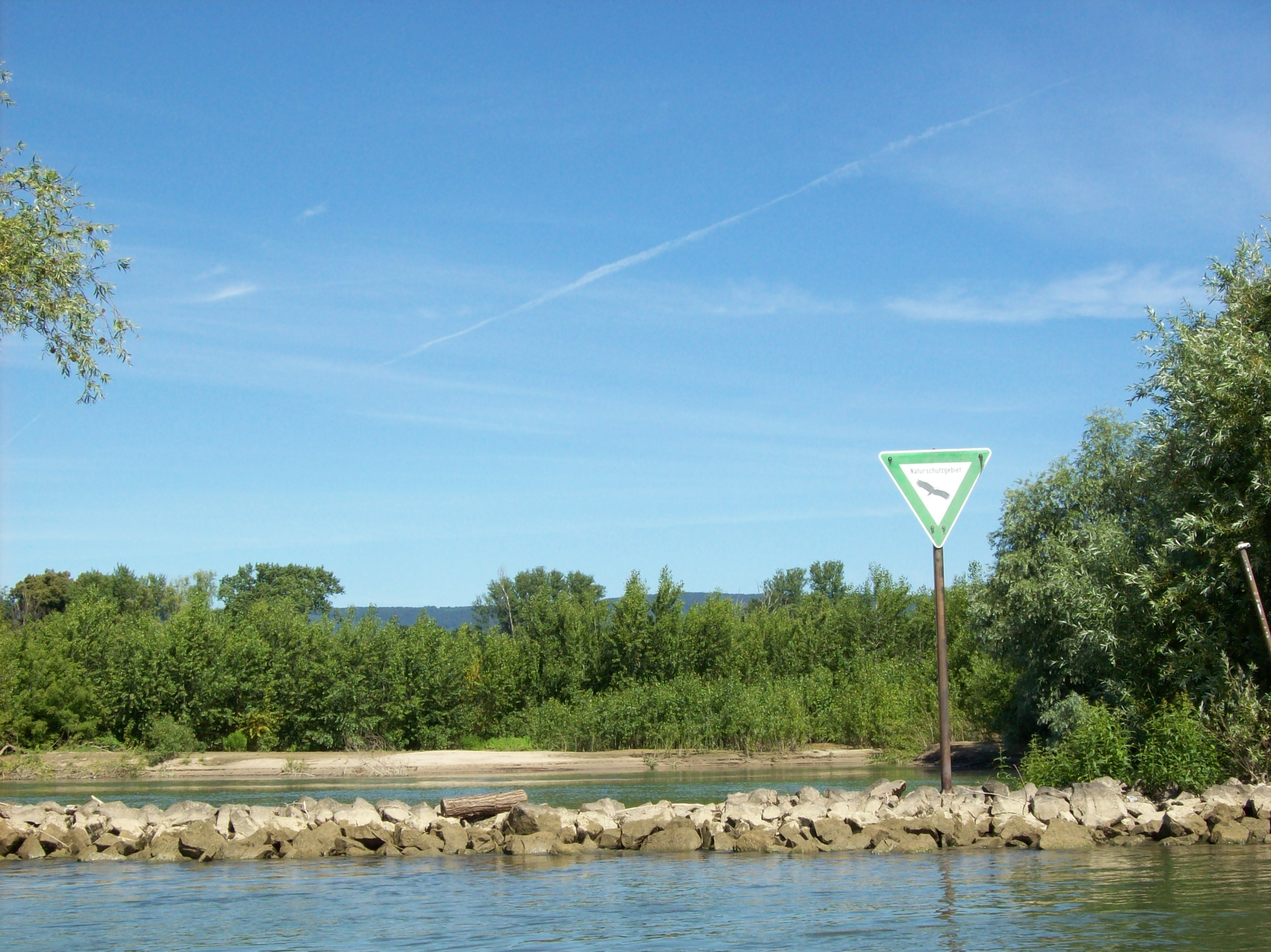 Mariannenaue, Blick von Norden (Große Gieß) auf Sanbank (NSG)